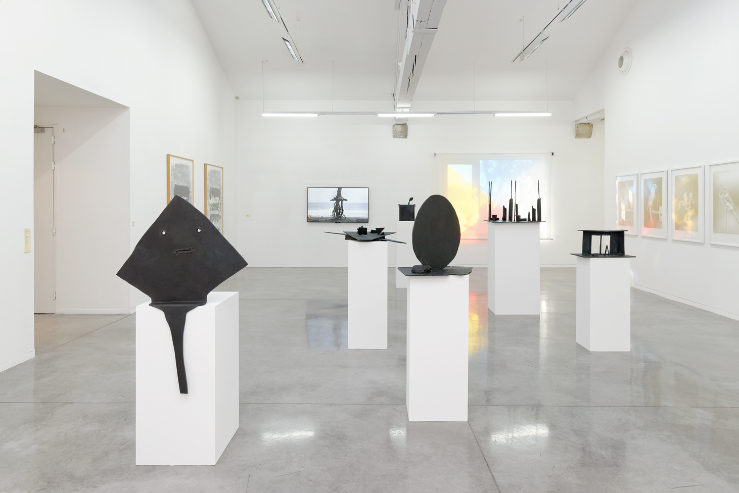 La Promenade, une balade dans le dépôt long du Cnap. Vue de l’exposition. Photographie Aurélien Mole.